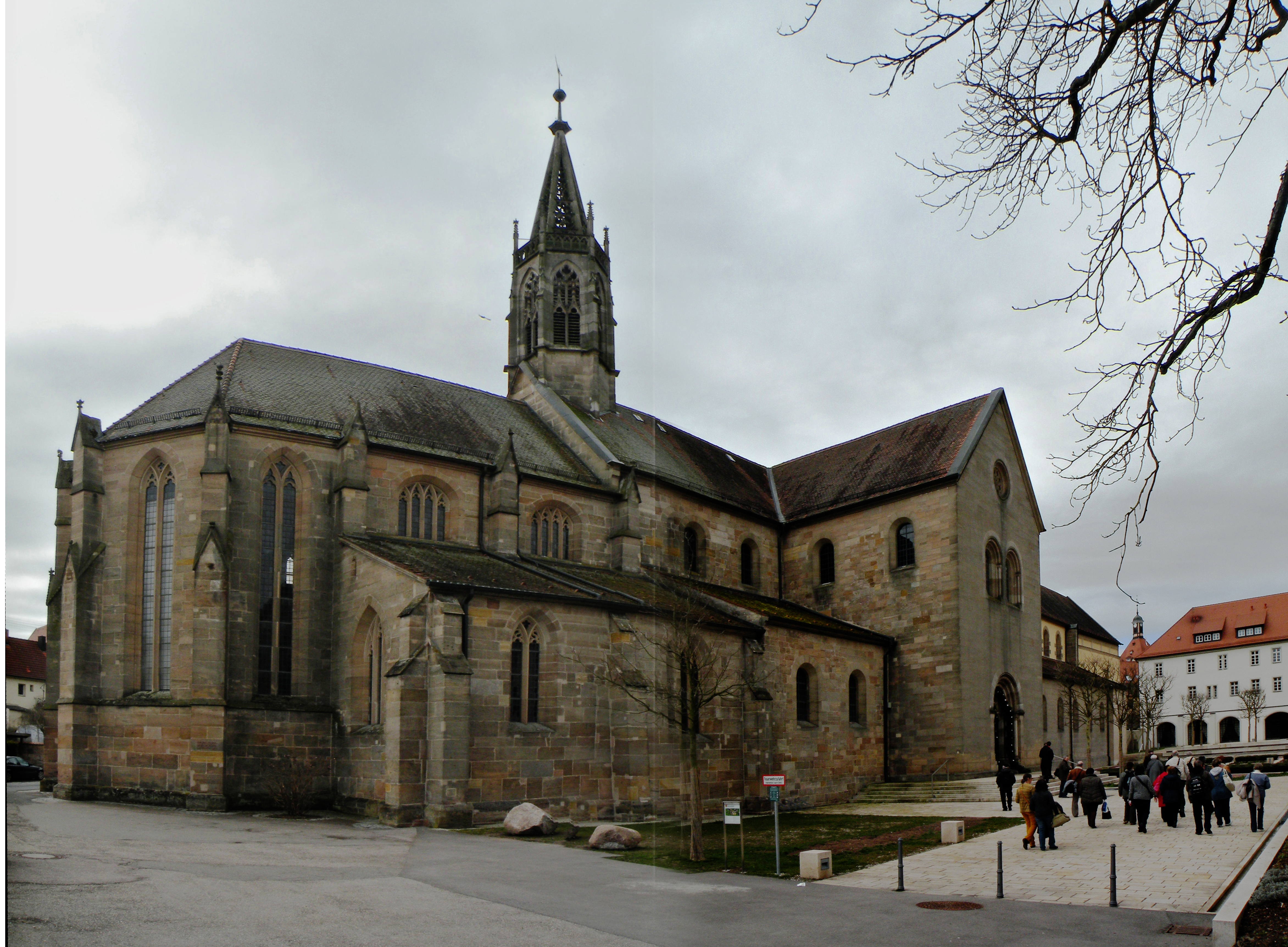 Общий вид мюнстера монастыря в Хайльсбронне